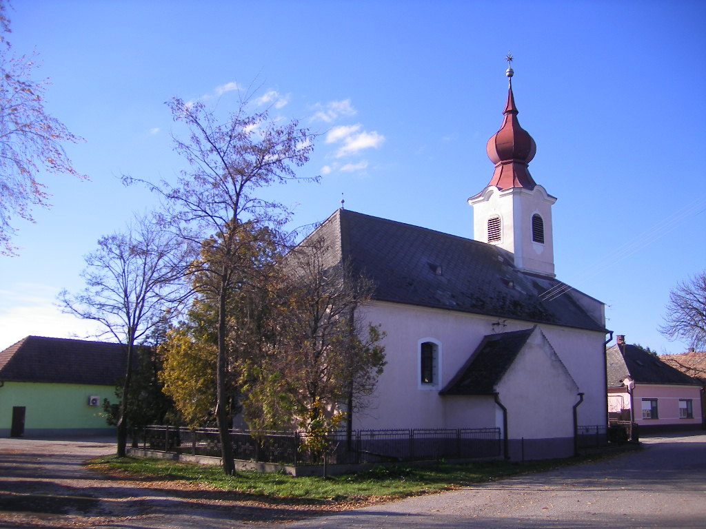 Csilizpatas - református templom